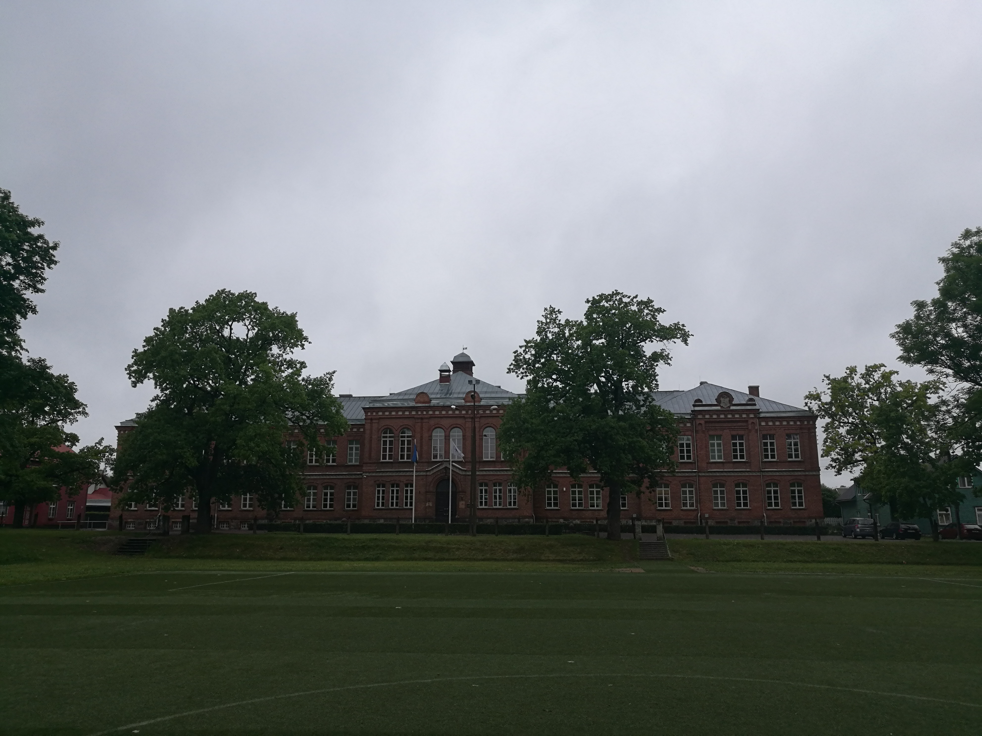 Ehem. livländisches Landesgymnasium